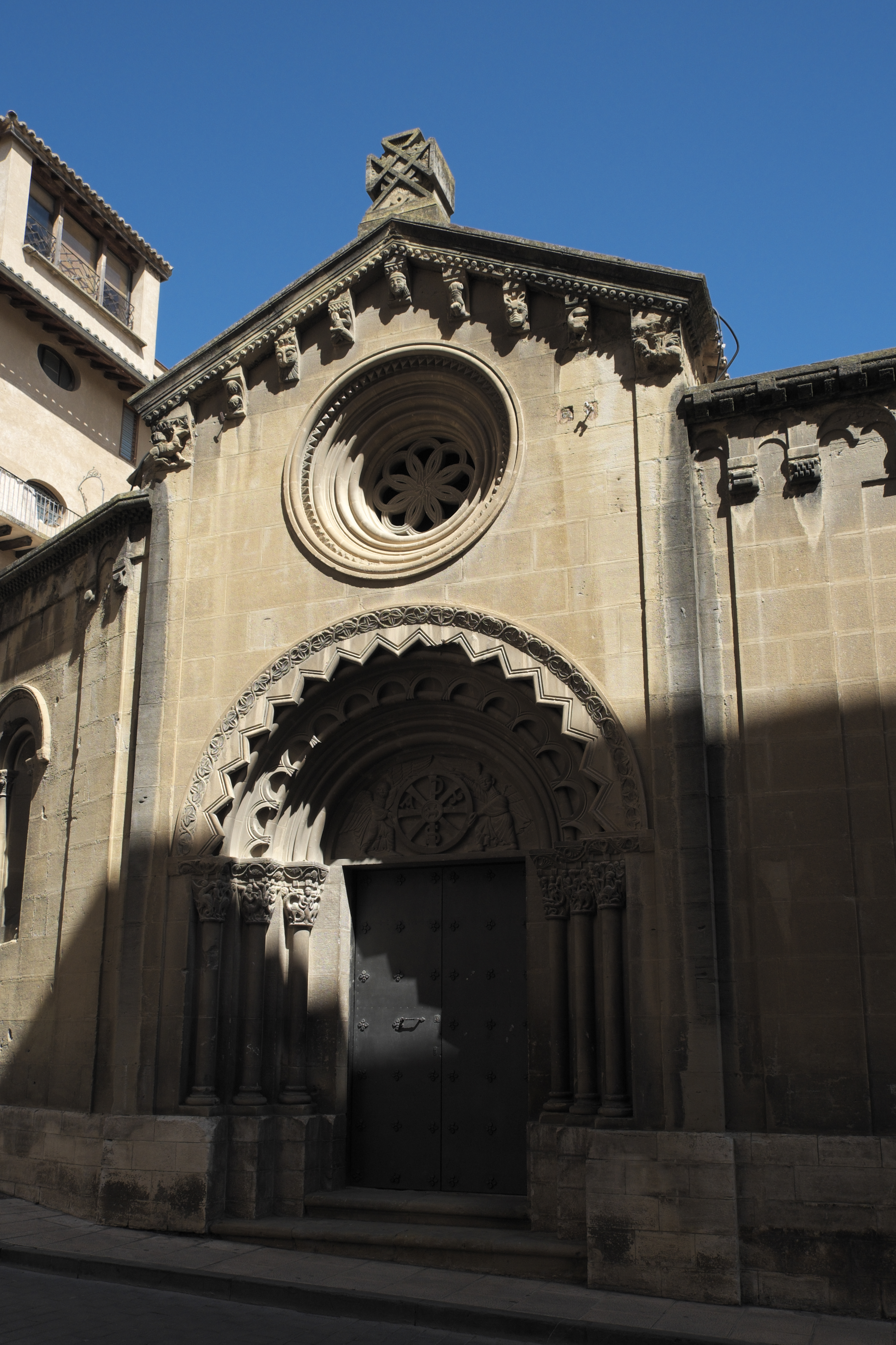 Ehemaliges Benediktinerkloster San Pedro el Viejo in Huesca in der Provinz Huesca (Aragón/Spanien), neoromanisches Portal an der Südseite des Keuzgangs